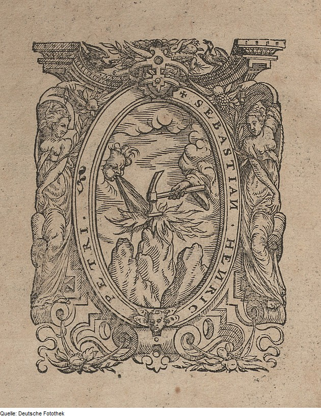 Original image description from the Deutsche Fotothek Druckermarke